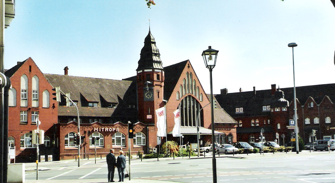 Foto zeigt den Stralsunder Hauptbahnhof im Juni 2006. Fotografiert habe ich das mit einer Canon EOS 300. Autor: Benutzer:Klugschnacker.